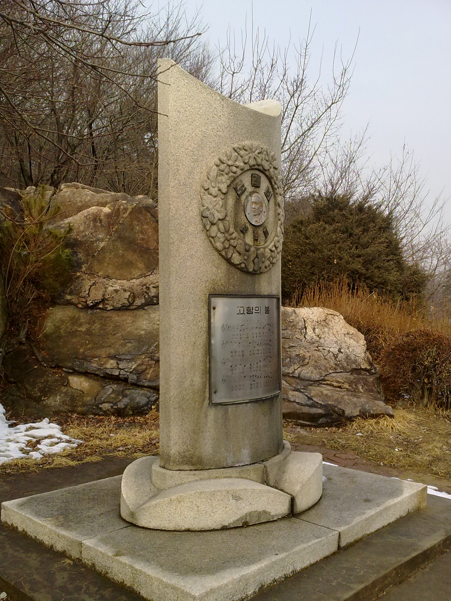 팔달산에 있는 홍난파 노래비